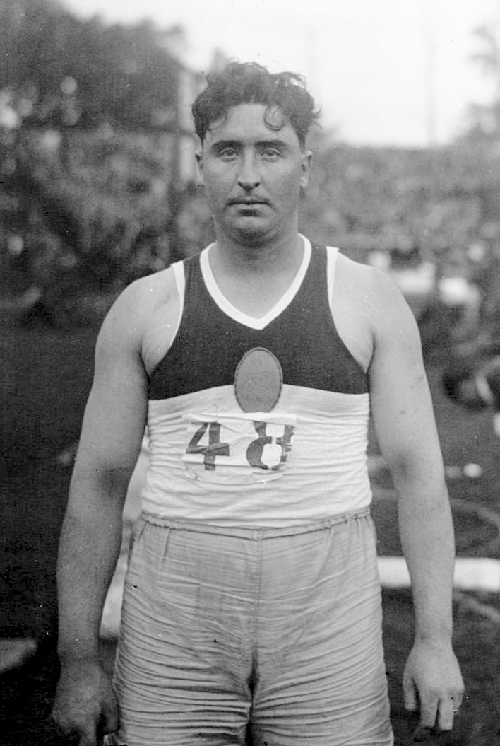 Colombes : athlétisme, France-Angleterre : Duhour (Français) poids (portrait à 2 m) : [photographie de presse] / Agence Meurisse